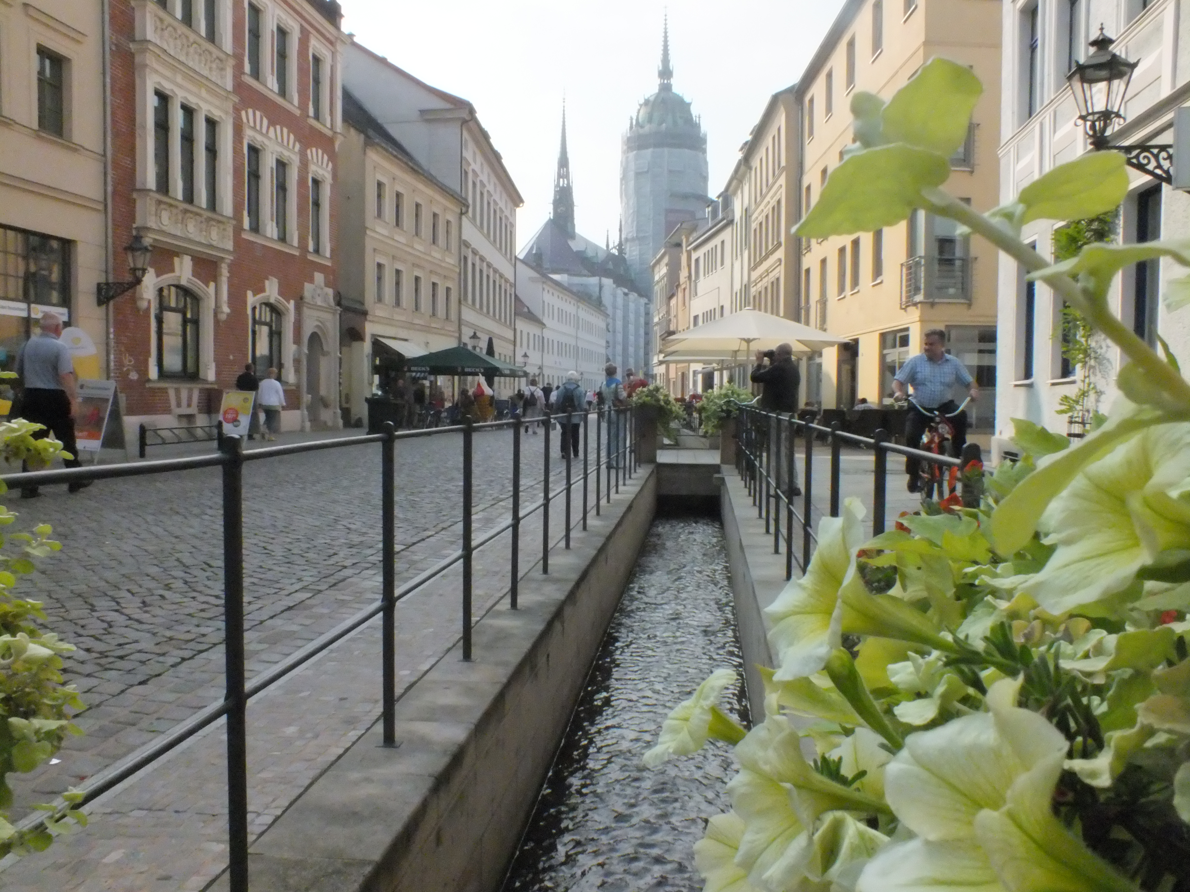 Wittenberg, Schlosstraße, Teilansicht mit freigelegtem Stadtkanal